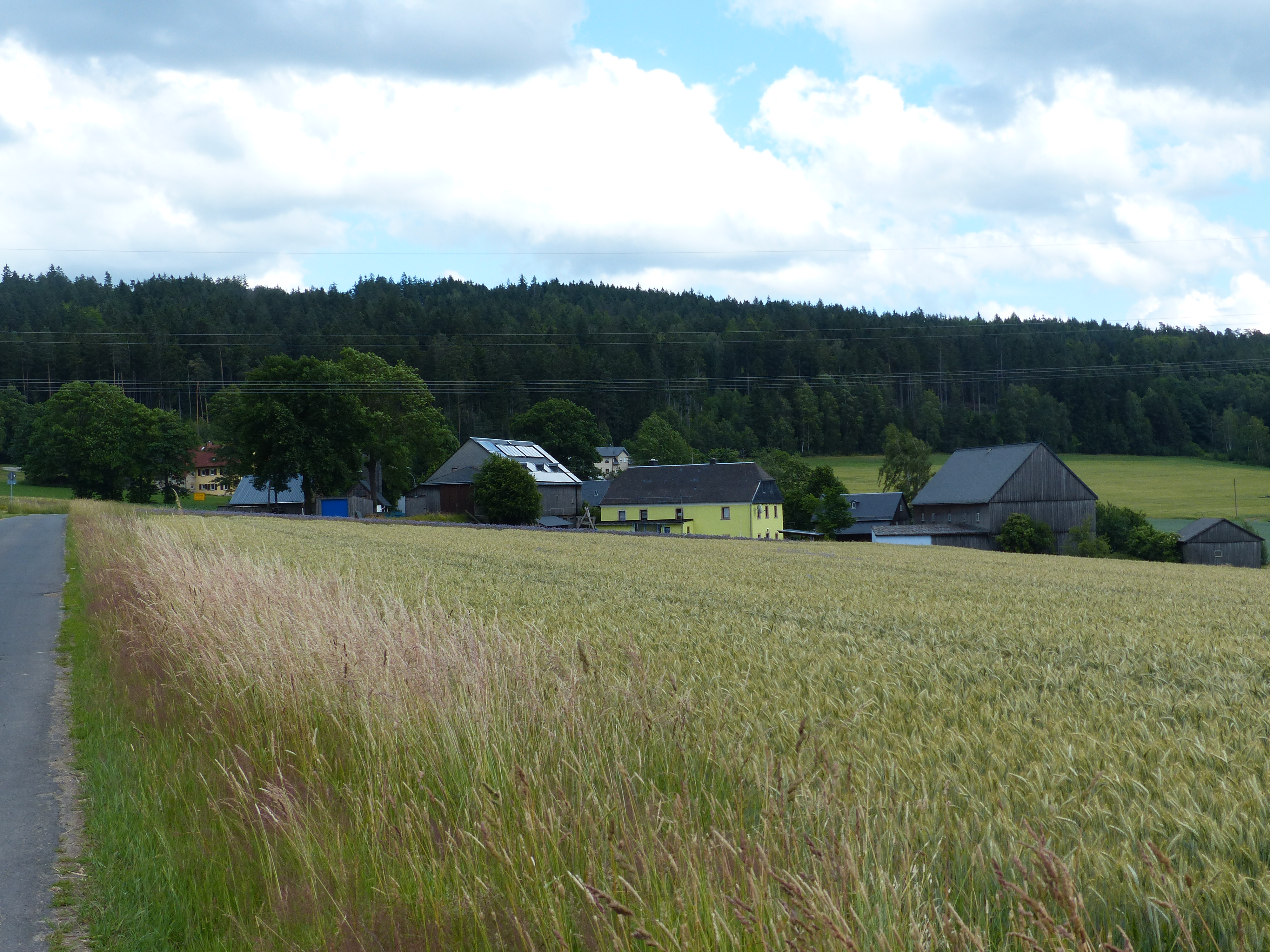 Ortsansicht